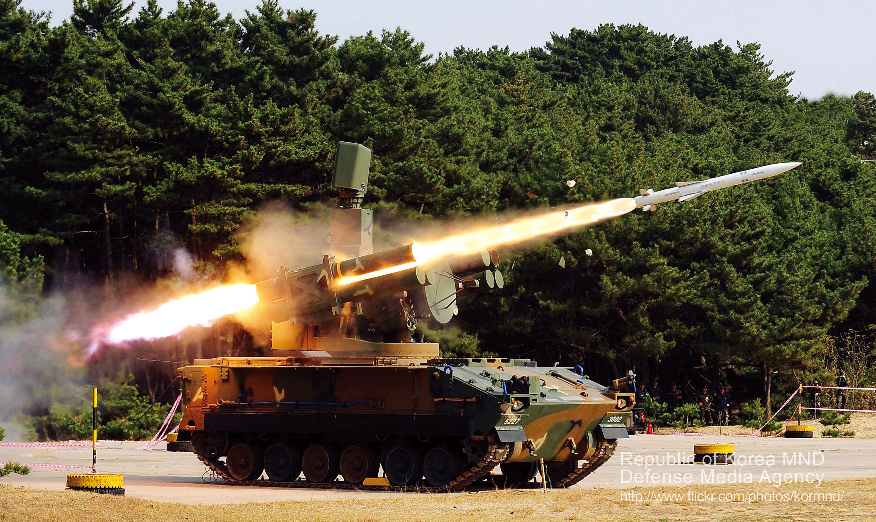 2009 국방화보 Rep. of Korea, Defense Photo Magazine 10월 22일 충남 대천 대공사격장에서 단거리 지대공 유도 무기 ‘천마’ 실사격이 실시됐다. 이날 실사격에서는 육군수 도방위사령부 방공단을 비롯해 1, 2, 7군단의 방공부대가 각 각 한 발씩 유도탄을 발사해 모두 표적기를 명중시켰다. 수 방사 방공단이 ‘천마’ 유도탄을 발사하는 장면.